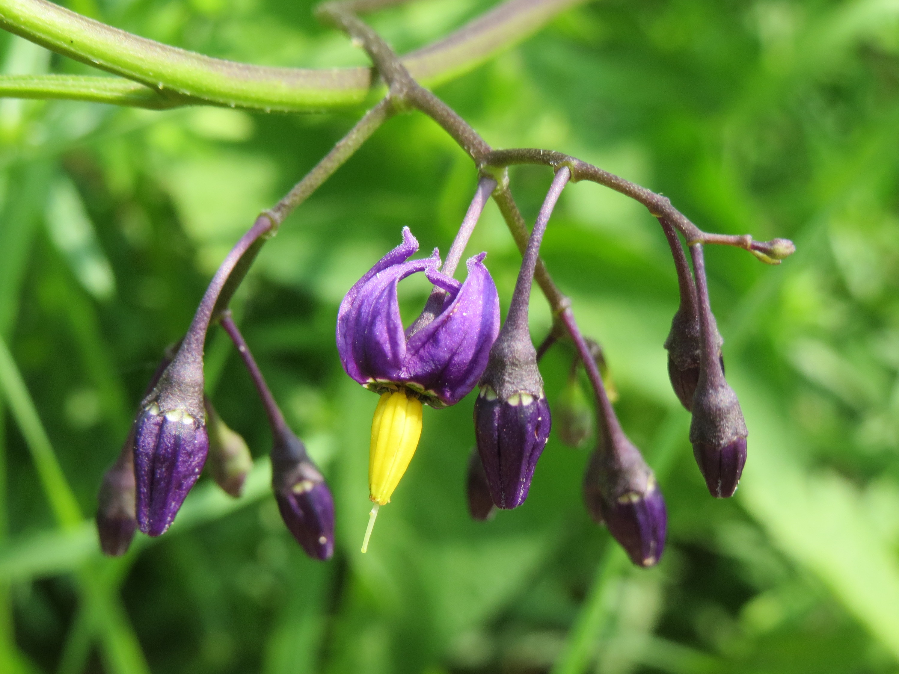 Bittersüßer Nachtschatten (Solanum dulcamara) am Kriegbach bei Neulußheim (Gemarkung Altlußheim)